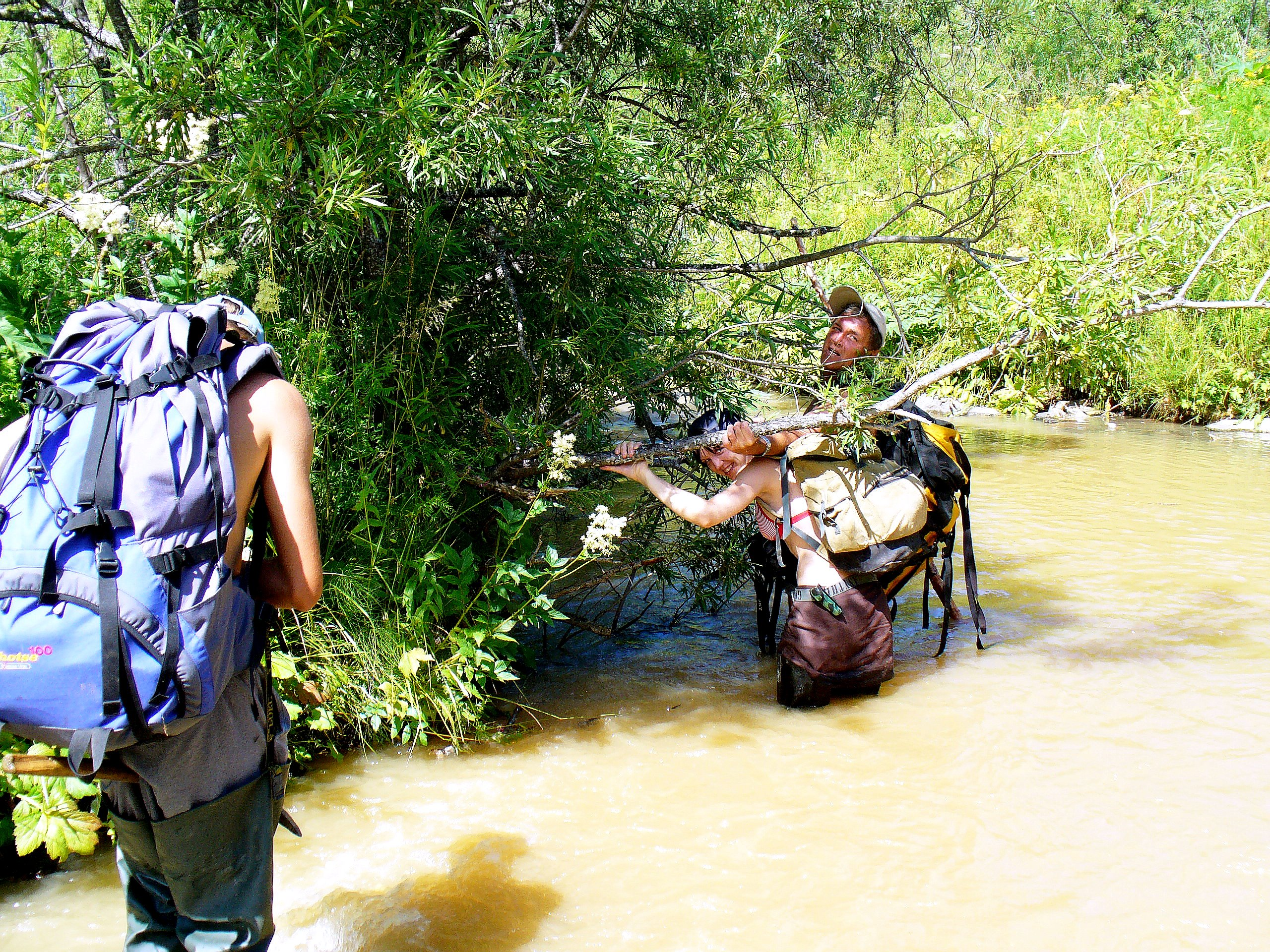 В поисковом маршруте на россыпное золото. Геоморфологи Томского государственного университета. Август, 2009. Горный Алтай. Фото А. Н. Рудого. (Heljqfy)